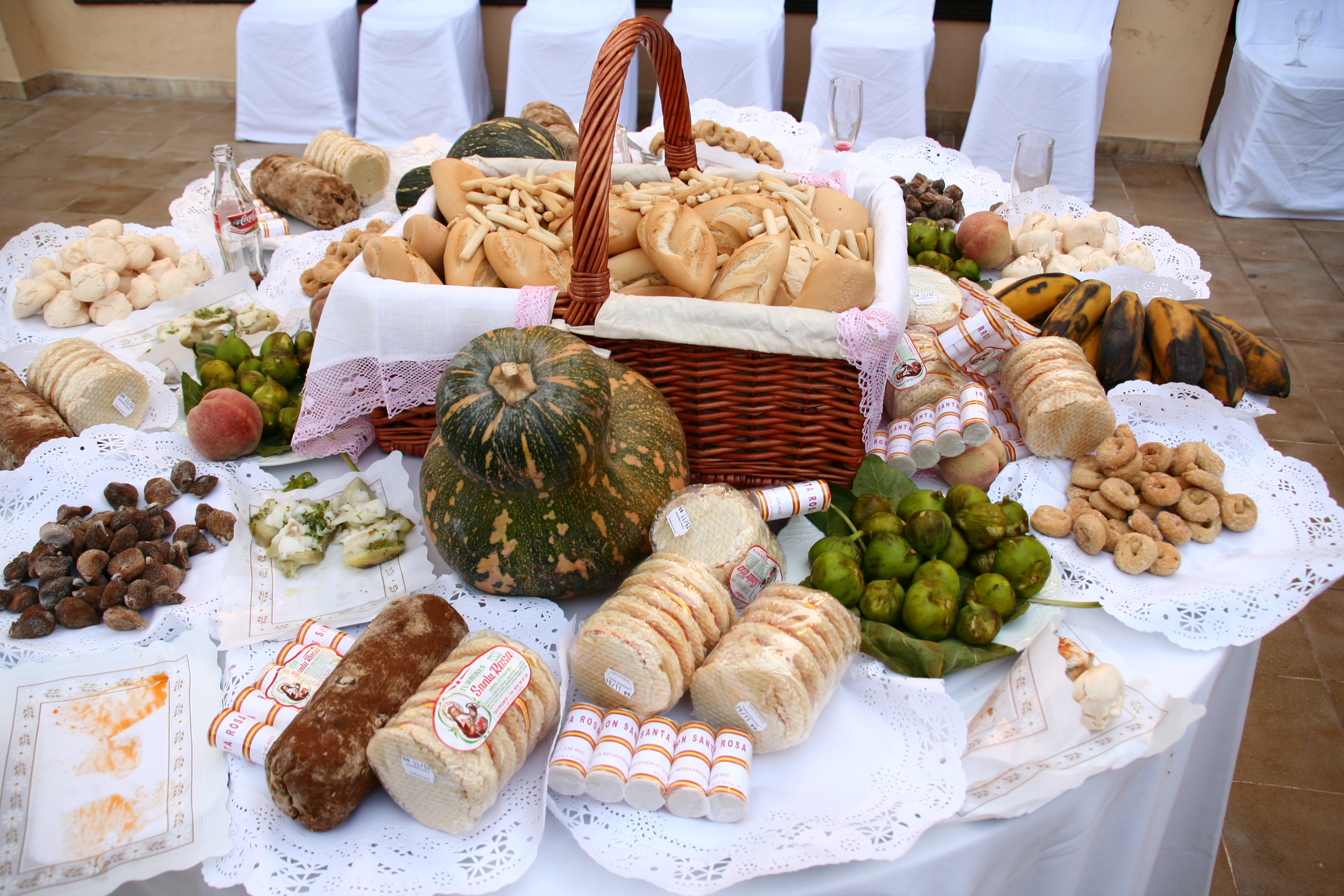 Mesa con productos canarios